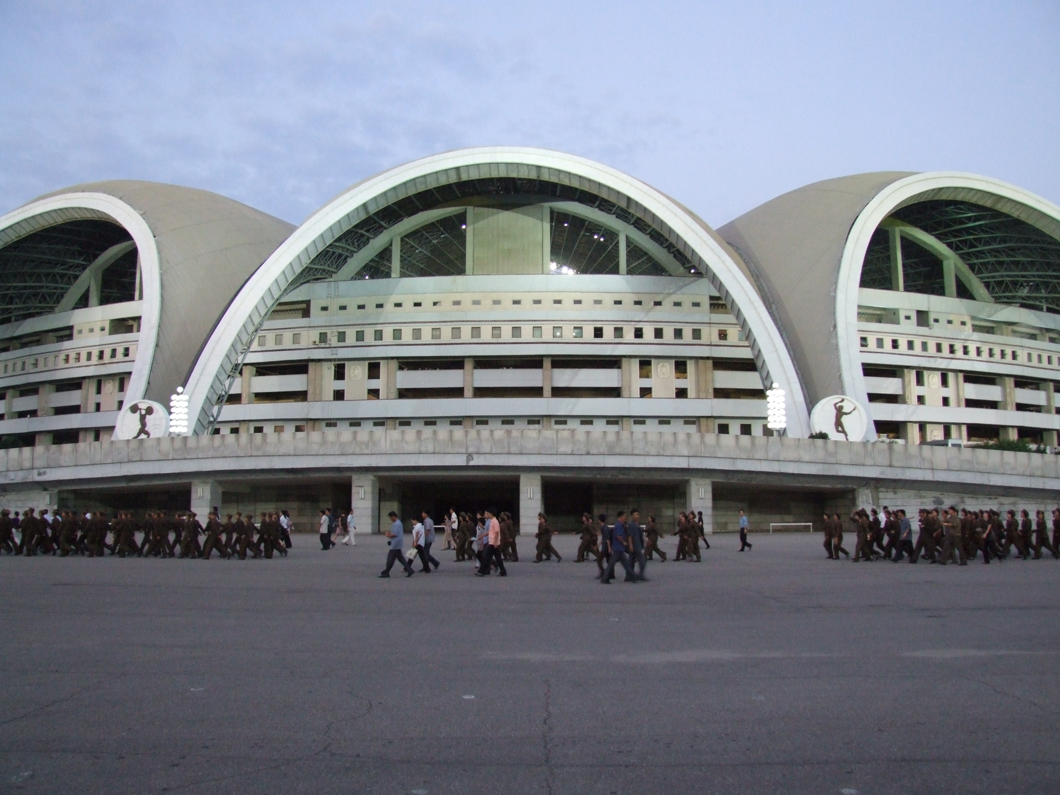 Stadion Erster Mai in Pjöngjang